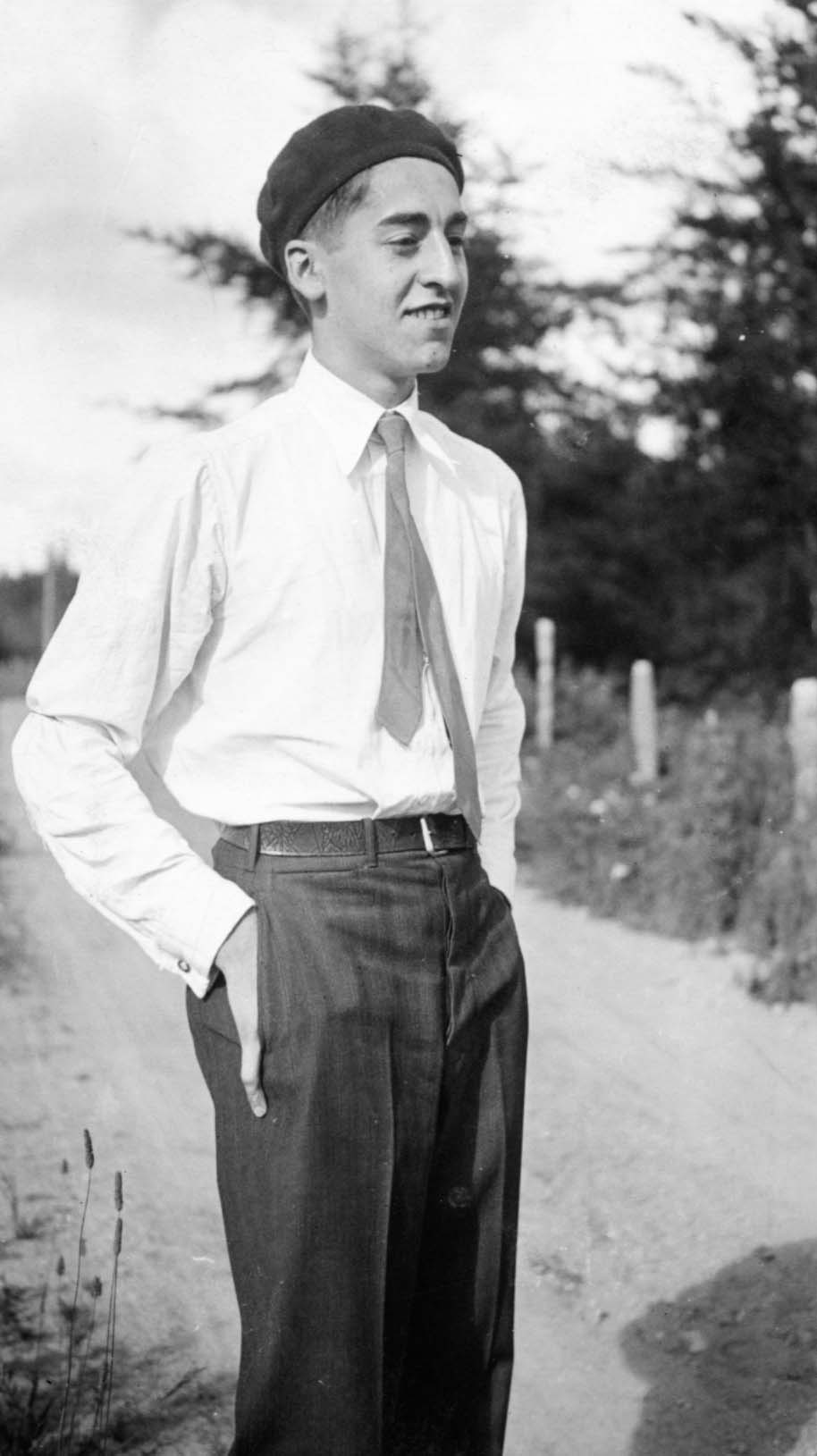 La pièce est une photographie de Jean Vallerand en août 1932.